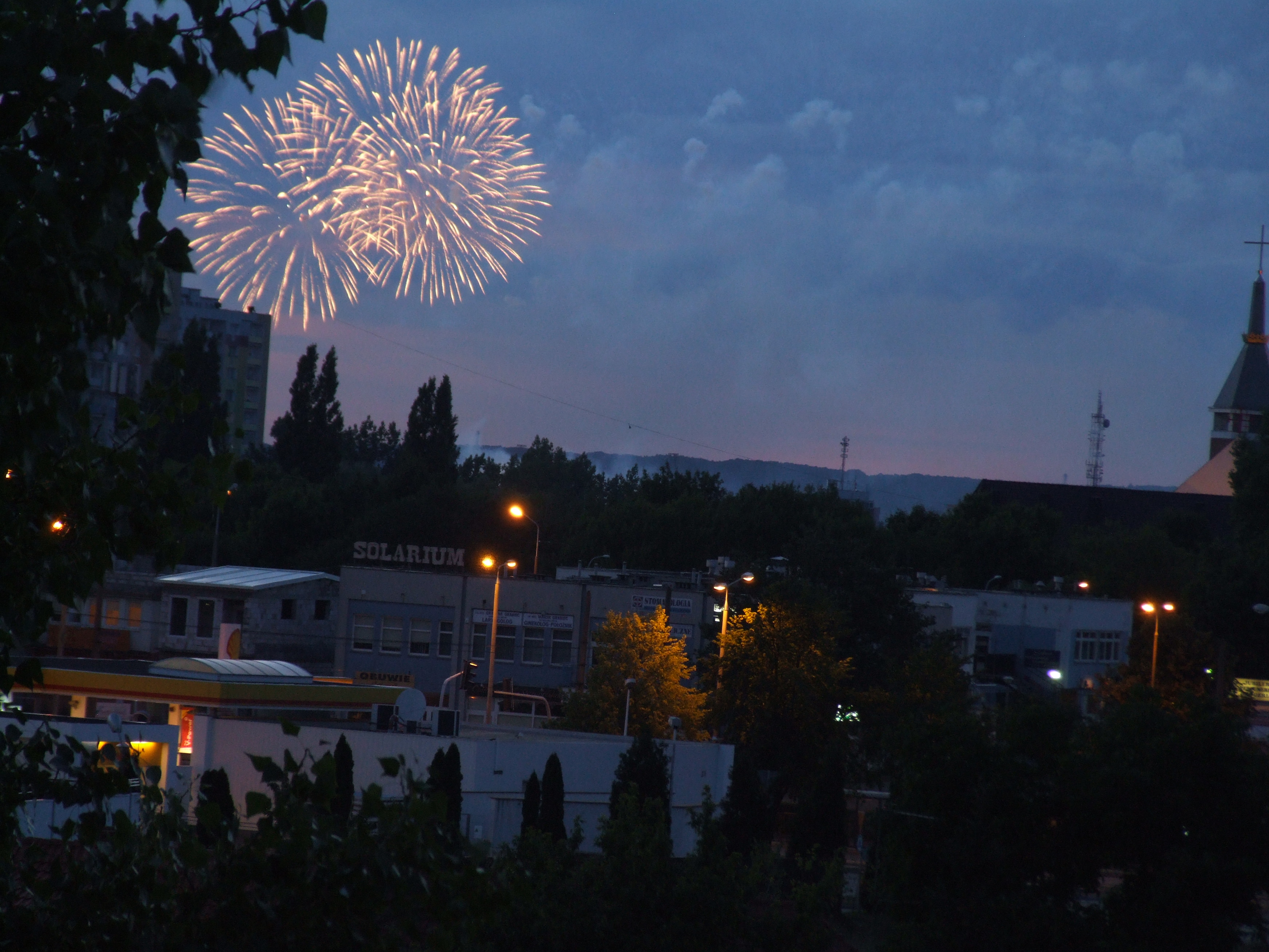 Stadion Zawiszy: 12. Mistrzostwa Świata Juniorów w Lekkeij Atletyce, Bydgoszcz, 8-13.07.2008